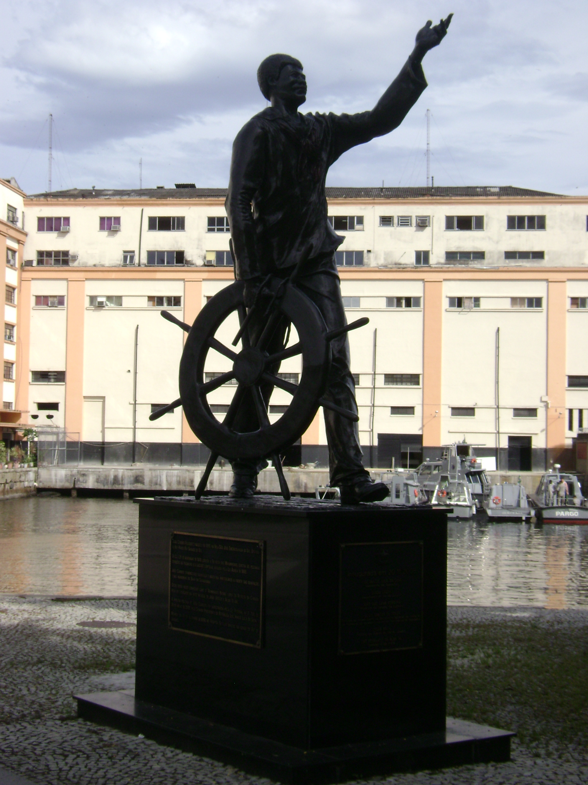 Estátua de João Cândido Felisberto no Rio de Janeiro, que atuou na Revolta da Chibata no Rio de Janeiro.